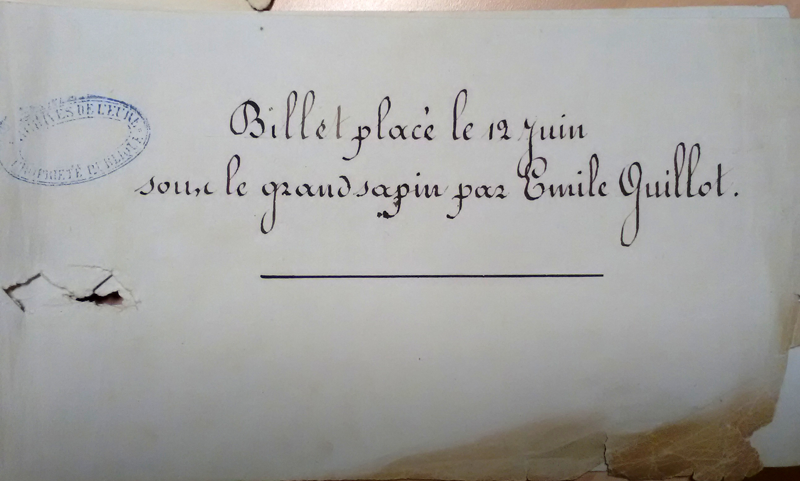 Document disponible aux archives départementales de l'Eure